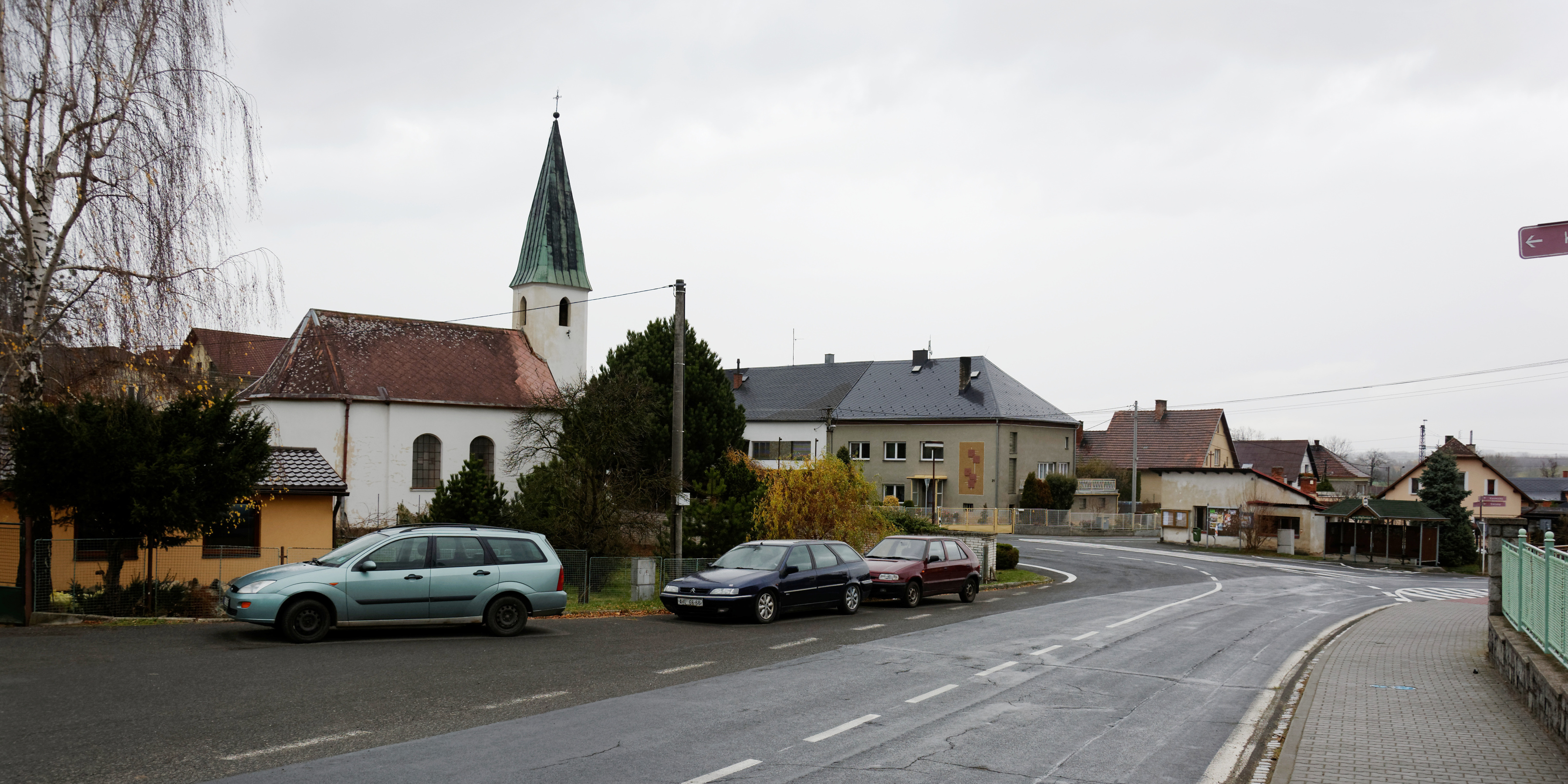 Jilešovice, střed obce.